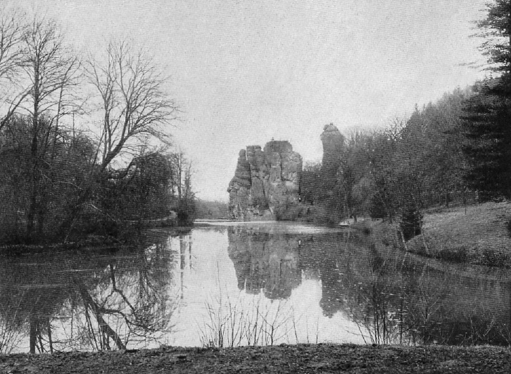 Originalbeschreibung „Die Externsteine“. – Die Externsteine mit dem künstlich aufgestauten Wiembecke-Teich im Vordergrund. Horn-Bad Meinberg, Kreis Lippe, Nordrhein-Westfalen, Deutschland.